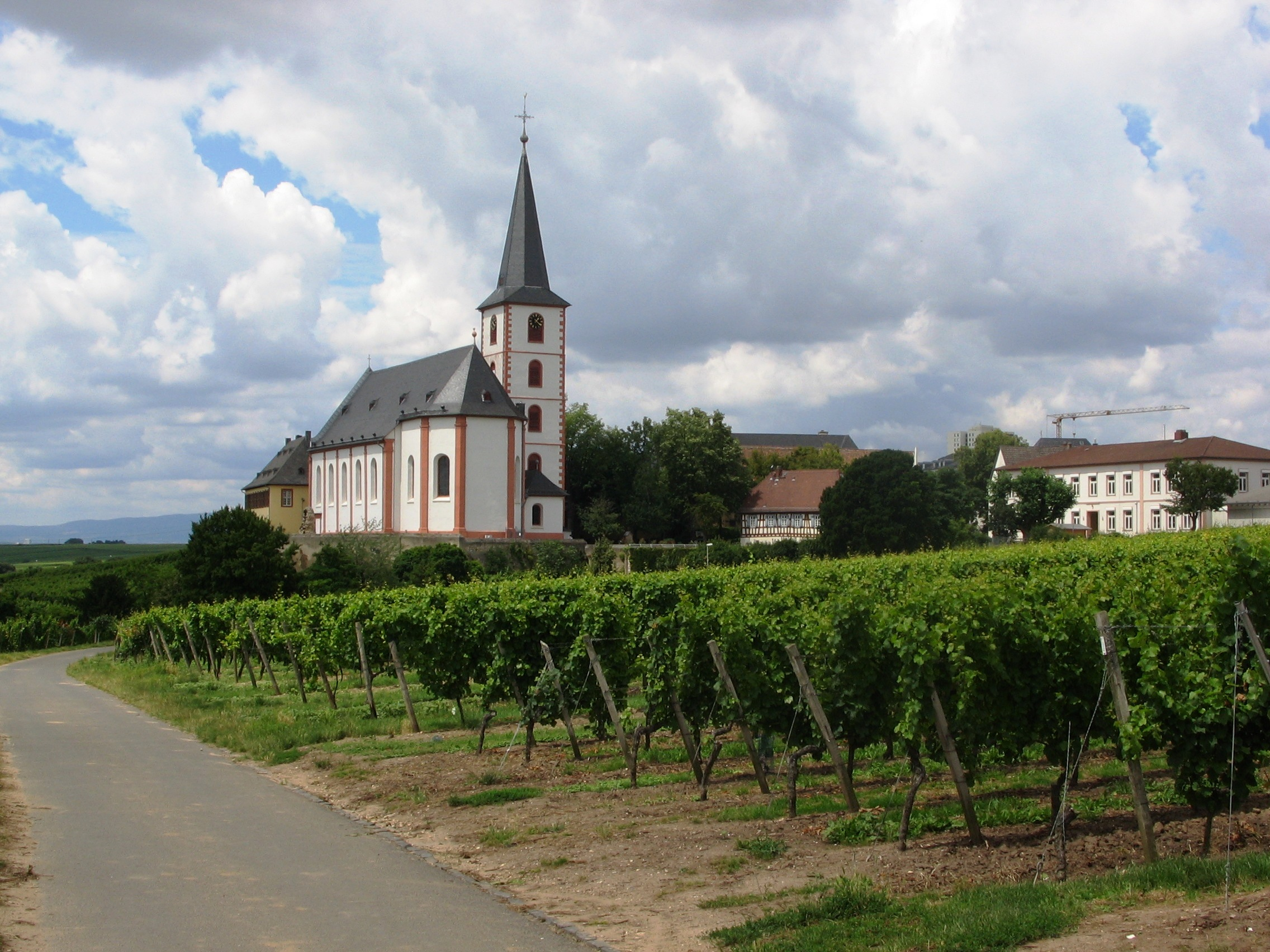 Blick von Osten über die Spitzenweinlage Hochheimer Kirchenstück zur katholischen Kirche St. Peter und Paul; rechts daneben das Küsterhaus über dem Stadttor und das Hauptgebäude der Weinbergschule (Grundschule). Das Haus links neben der Kirche war früher ein Domänengebäude der Hessischen Staatsweingüter. Am Horizont erhebt sich der Kamm des Rheingaugebirges.